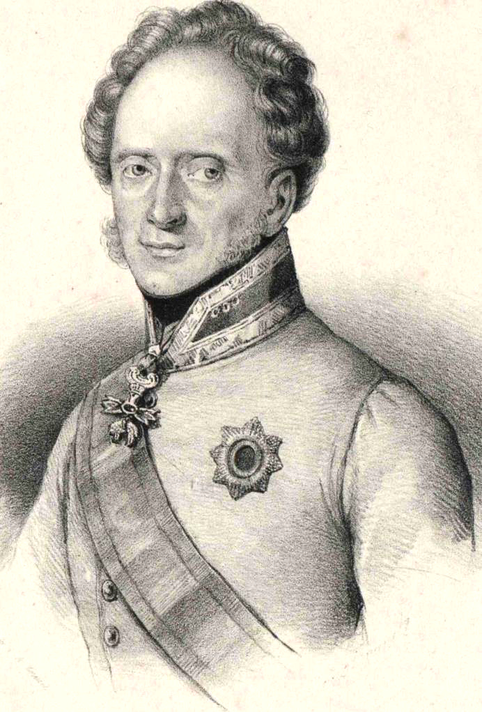 Paul Anton Fürst Esterhazy von Galantha